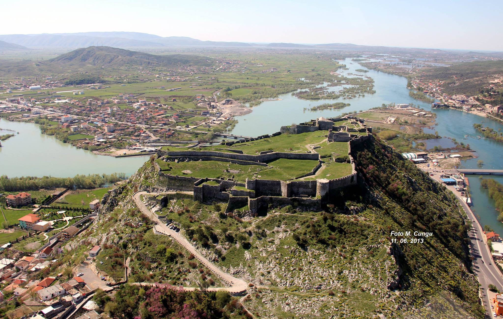 Ndertimi i ketij monumenti fillon qe ne periudhen ilire (shek IV para kr.). Gjatë periudhës romake ajo ka shërbyer si një akropol për qytetin, që shtrihej rrëzë shpatit jugor të kodrës. Gjatë mesjetës ne Shkoder here pas here alternohej sundimi sundimi bizantin me atë sllav deri më 1335, kur u zotërua nga Balshajt, të cilët e mbajtën nën sundimin e tyre deri në vitin 1396 kur ia dorëzuan Venecianeve te cilet bene ndertime fortifikuese te rendesishme qe gjenden edhe sot. Muret e kalasë Rozafat te cilet ndjekin formën e terrenit, jane të ngritura mbi majën e një kodre shkëmbore te rrethuar nga tri anet me lumej. Sipërfaqja e brendshme e kalasë (3.5 ha) përbëhet nga tri pjesë të fortifikuara (oborre), të cilat komunikonin me porta midis tyre. Objekti kryesor këtu është Kapiteneria, një godinë trekatëshe e kohës veneciane, e trajtuar në mënyrë monumentale. Përveç hyrjes kryesore, kalaja ka dhe disa hyrje të vogla të dorës së dytë, të cilat shërbenin për manovrimin e forcave në raste rrethimi apo si dalje sekrete.